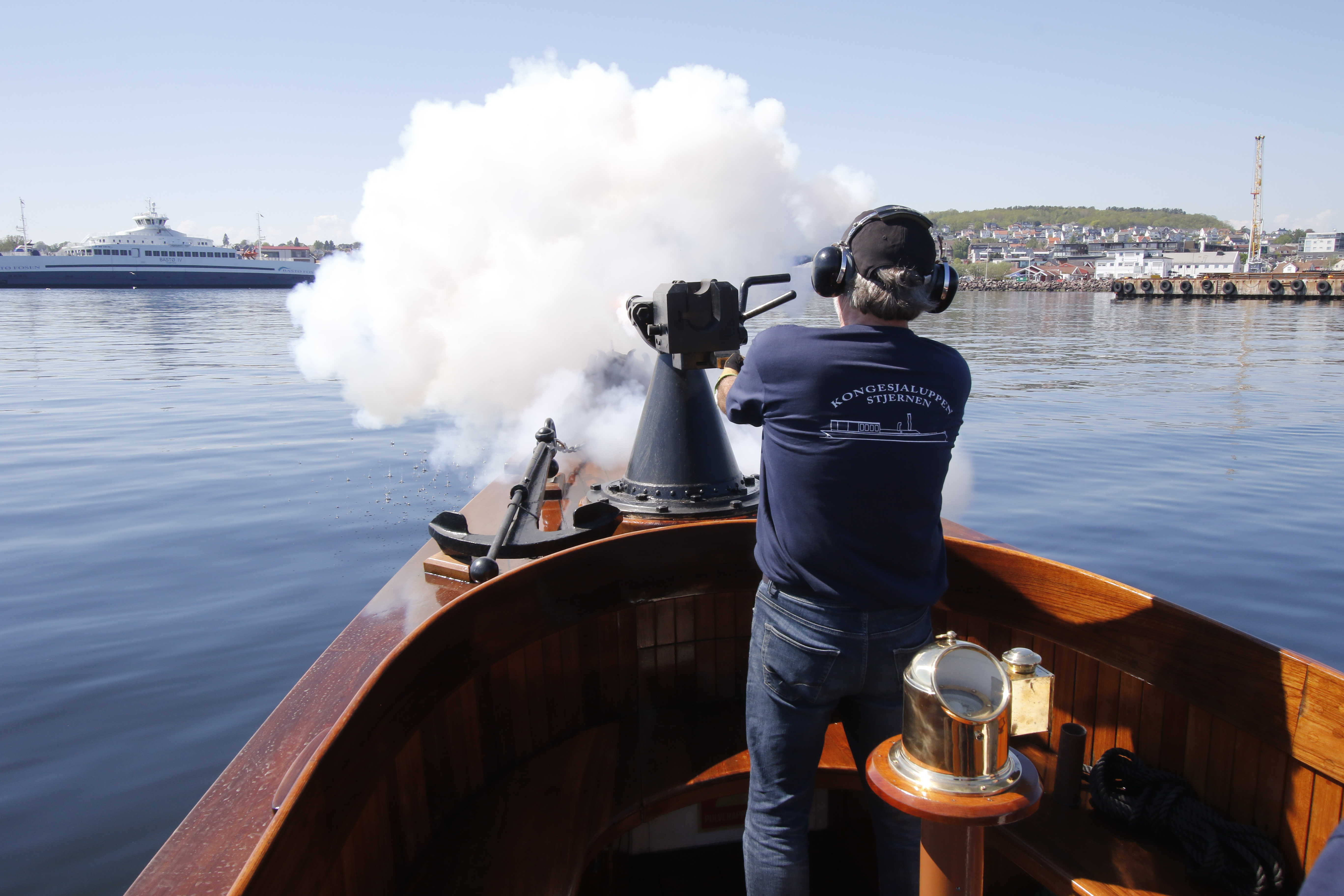 Saluttkanonen på Kongesjaluppen Stjernen fyres av utenfor Horten Gjestehavn.